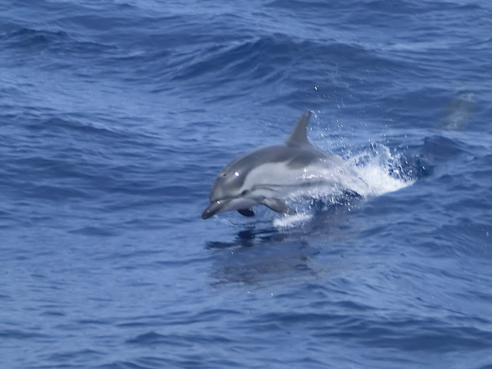 Stenella striata nel Santuario dei Cetacei del Mediterraneo